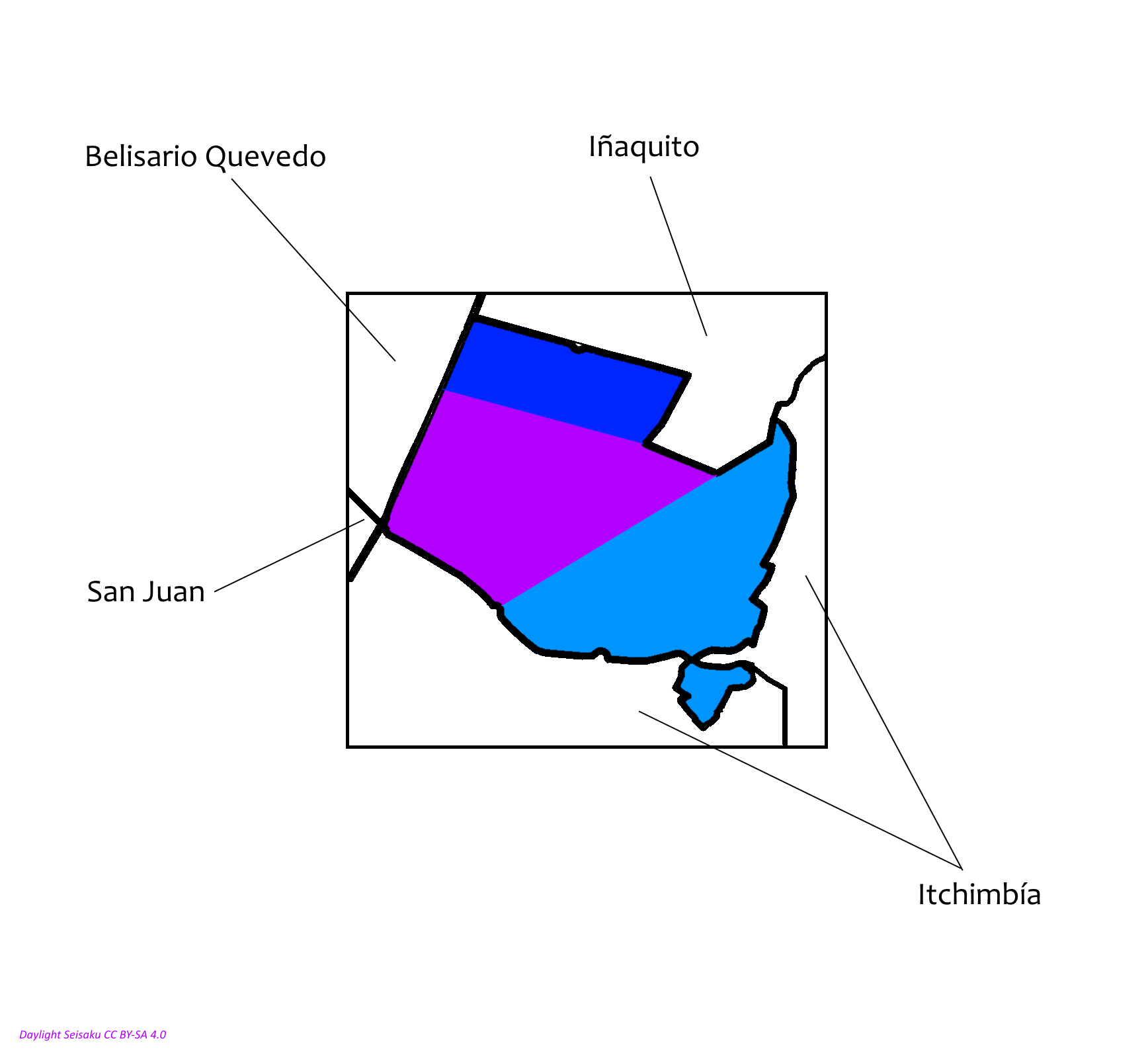 División de la parroquia Mariscal Sucre en barrios. Alrededor, parroquias limítrofes: Itchimbía, Belisario Quevedo, Iñaquito y San Juan.